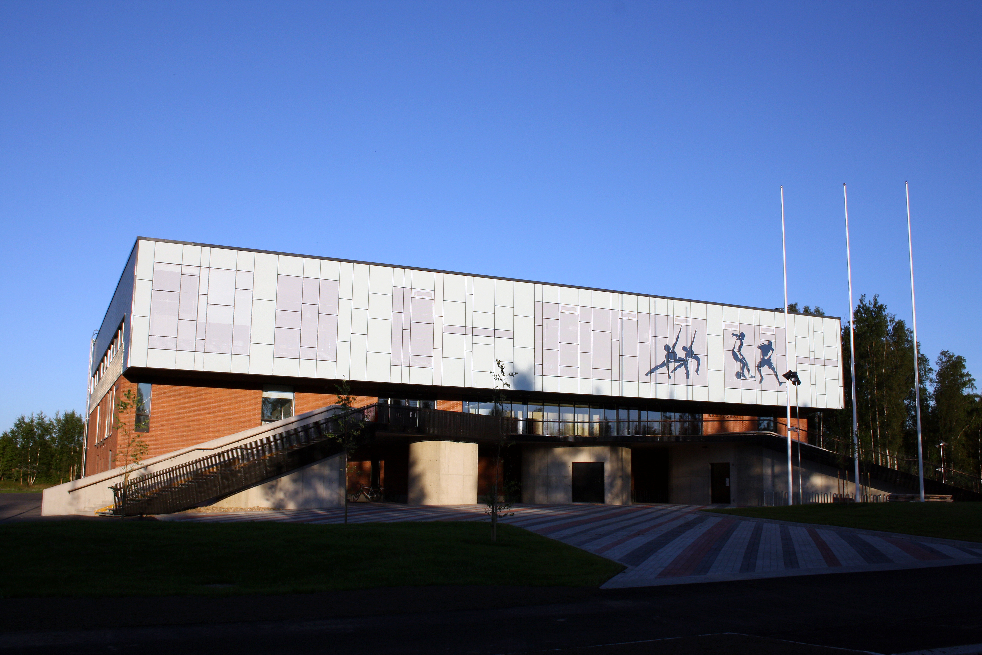 Kampushalli Kokkolassa, Suomessa.